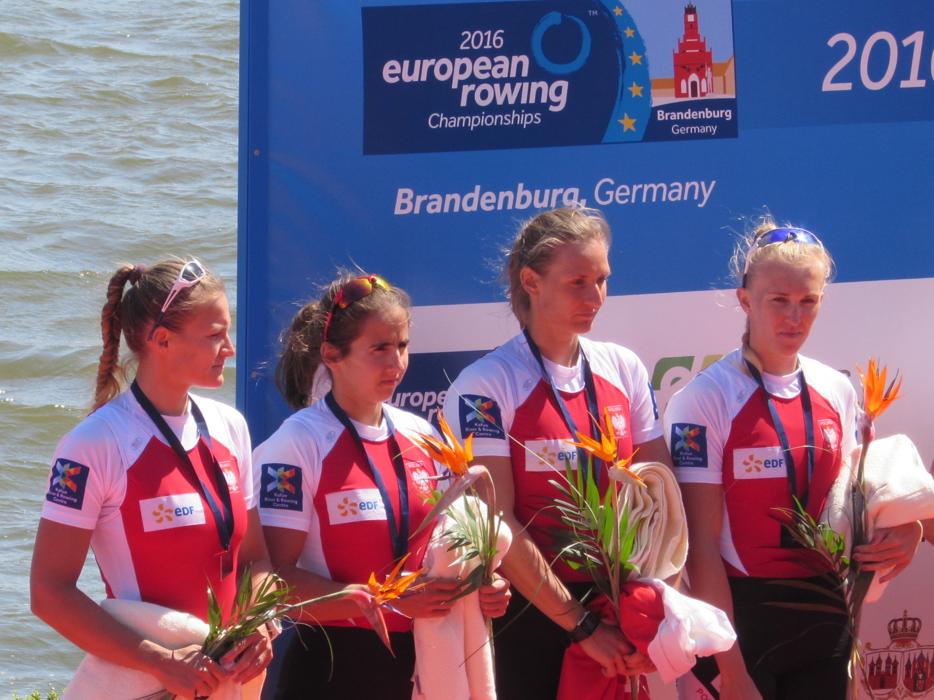 Agnieszka Kobus, Joanna Leszczyńska, Maria Springwald, Monika Ciaciuch, Ruder-EM 2016